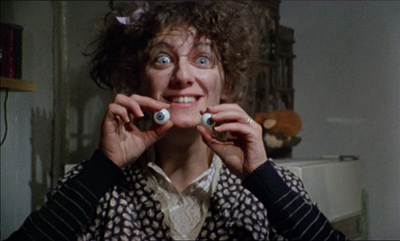 Screenshot del film Ratataplan (1979).